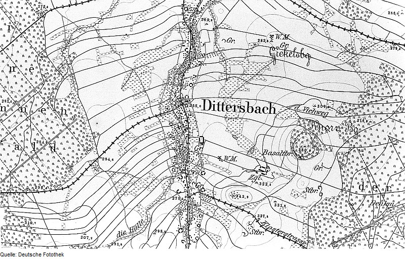 Original image description from the Deutsche Fotothek Bernstadt auf dem Eigen-Dittersbach auf dem Eigen. Meßtischblatt, Sekt. Ostritz, 1884 (Sign.: VII 167.15)